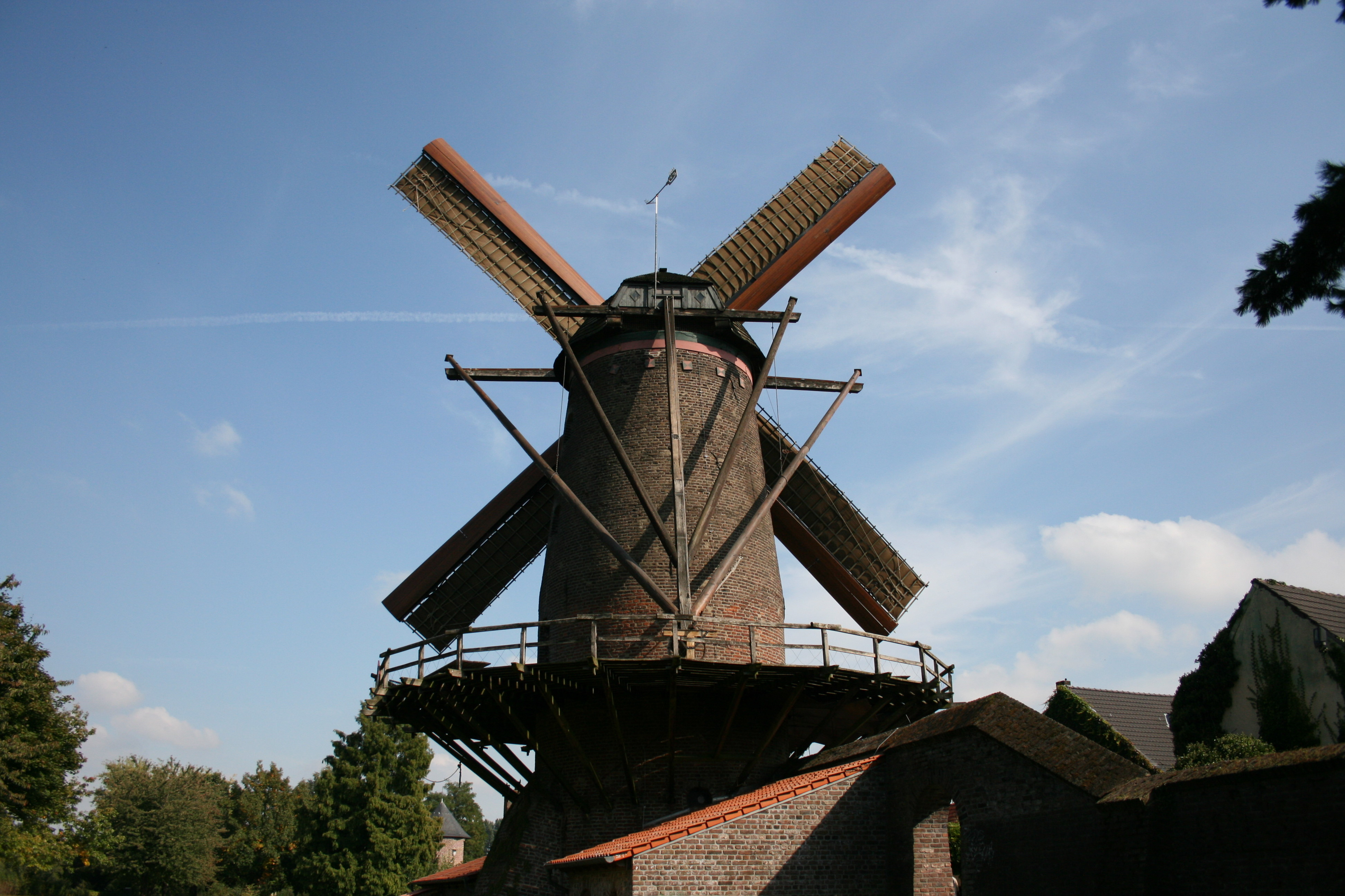 Krimhildmühle am Nordwall in Xanten